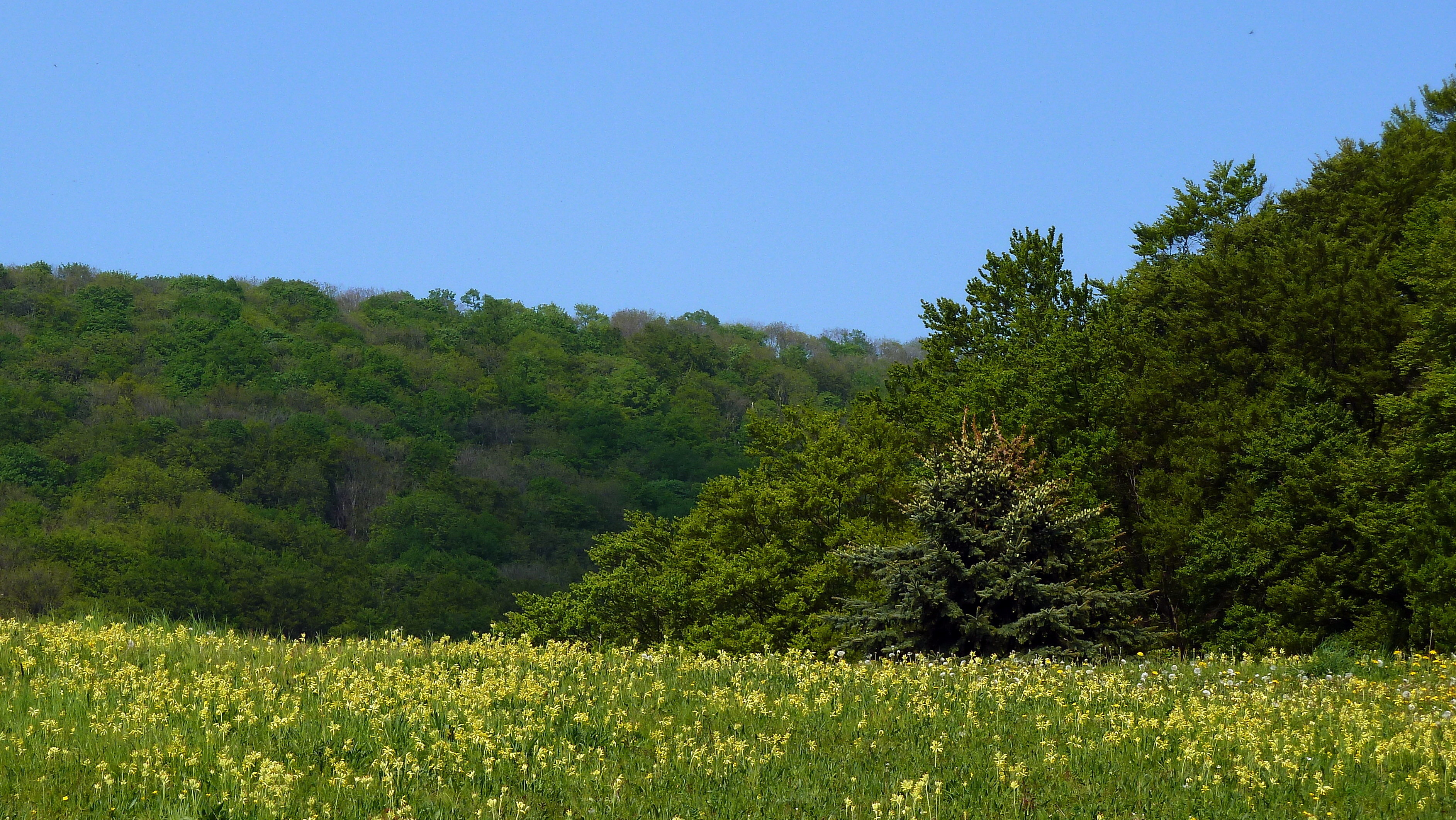 Auf den Wiesen des Naturschutzgebietes blühen im April unzählige Schlüsselblumen (Primula veris).